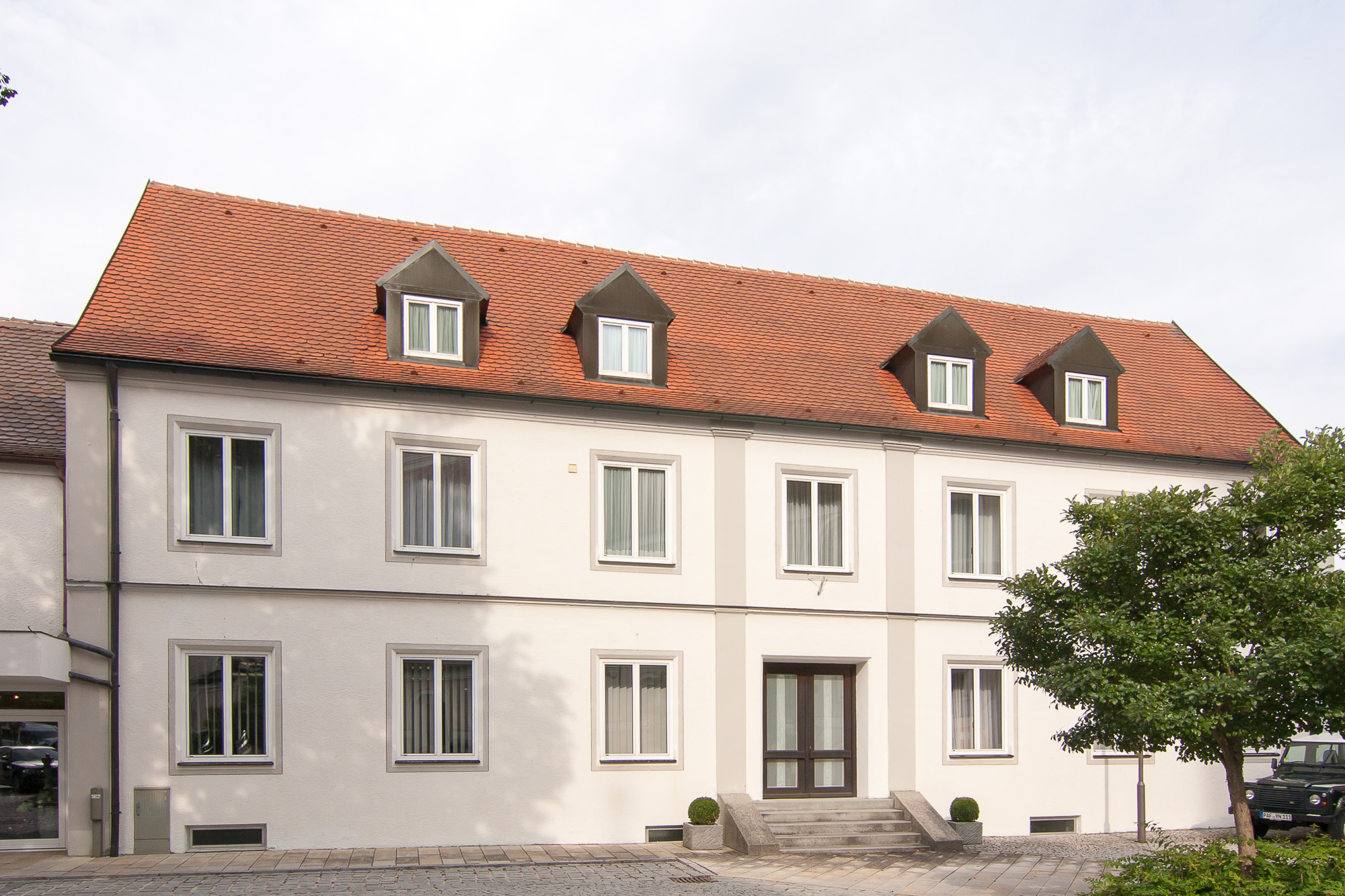 Mädchenschulhaus; Traufseitbau mit Lisenen, 3. Viertel 19. JahrhundertThis is a photograph of an architectural monument.